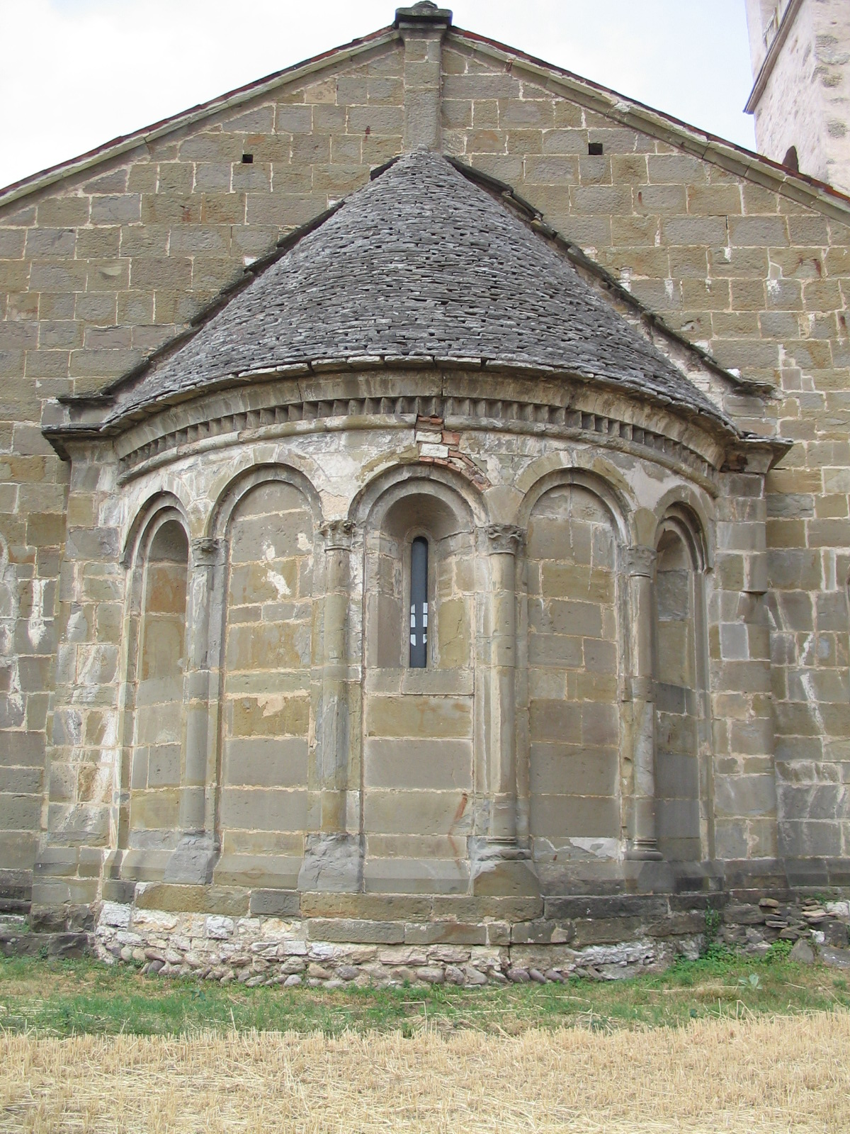 San Giorgio in Lemine, chiesa romanica.